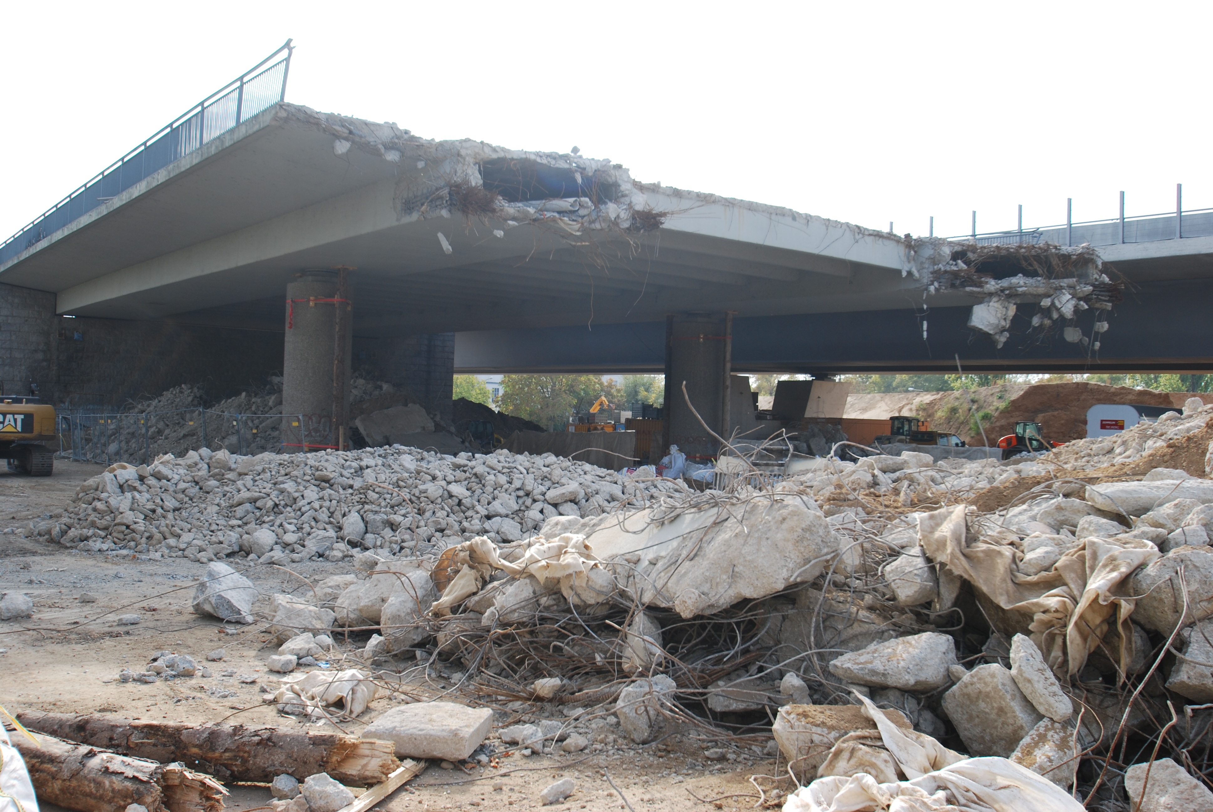 Abrisskante der alten Auffahrt zur Schiersteiner Brücke, Wiesbaden, Höhe Rheingaustraße, Oktober 2018